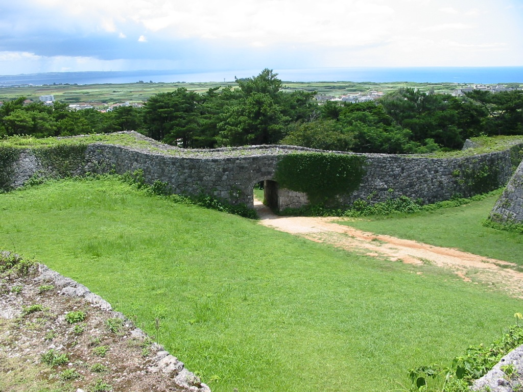 At Zakimi-jo castle site